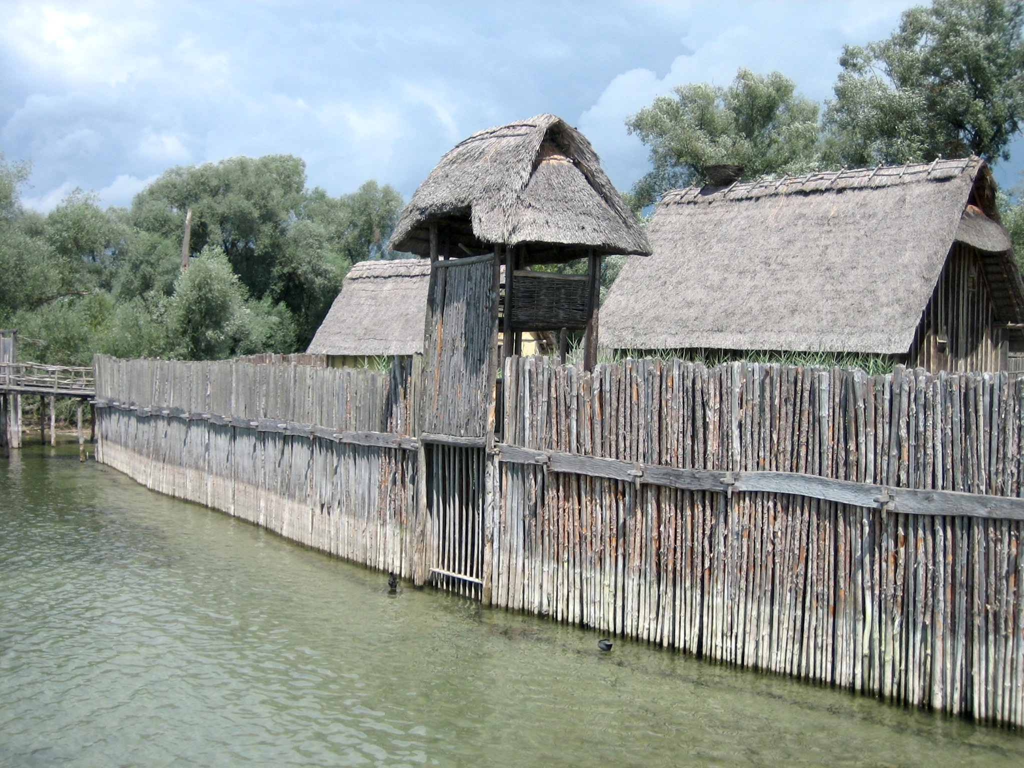 Palisade im Pfahlbaudorf Unteruhldingen